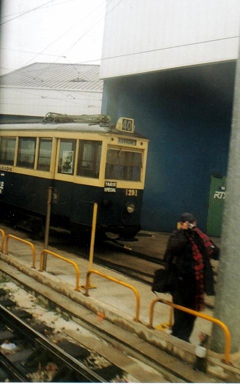 Une motrice de l'ancienne ligne d'Aubagne